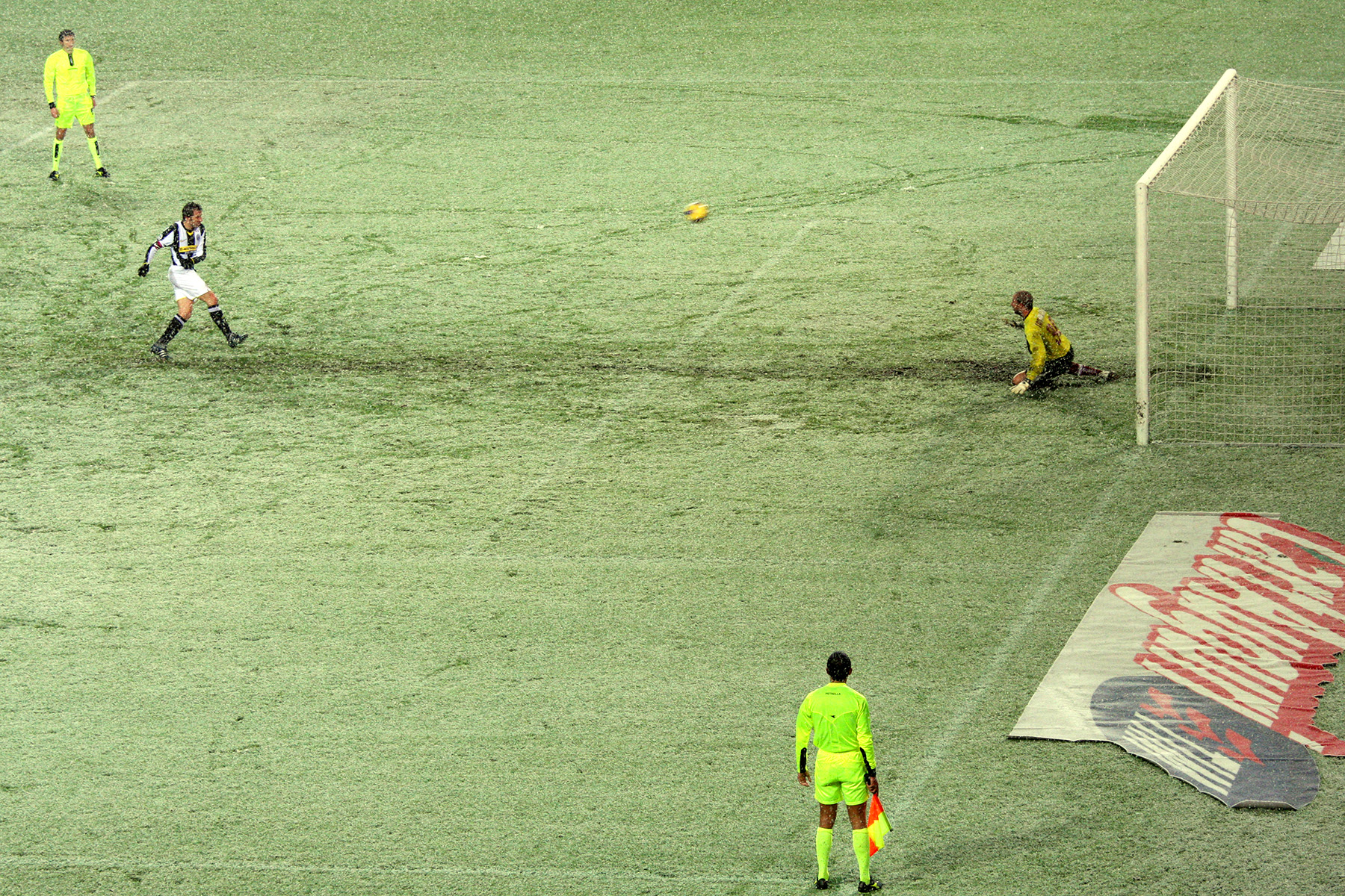 Torino, 29 novembre 2008. Sotto la neve, Alessandro Del Piero segna il suo 250º gol con la maglia bianconera trasformando il rigore del definitivo 4-0 in occasione di Juventus-Reggina, 14ª giornata del campionato di Serie A 2008/2009.